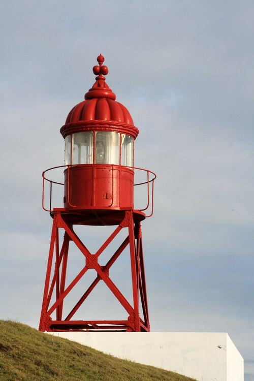 Farol de Santa Clara, Ponta Delgada, São Miguel, Açores, Portugal